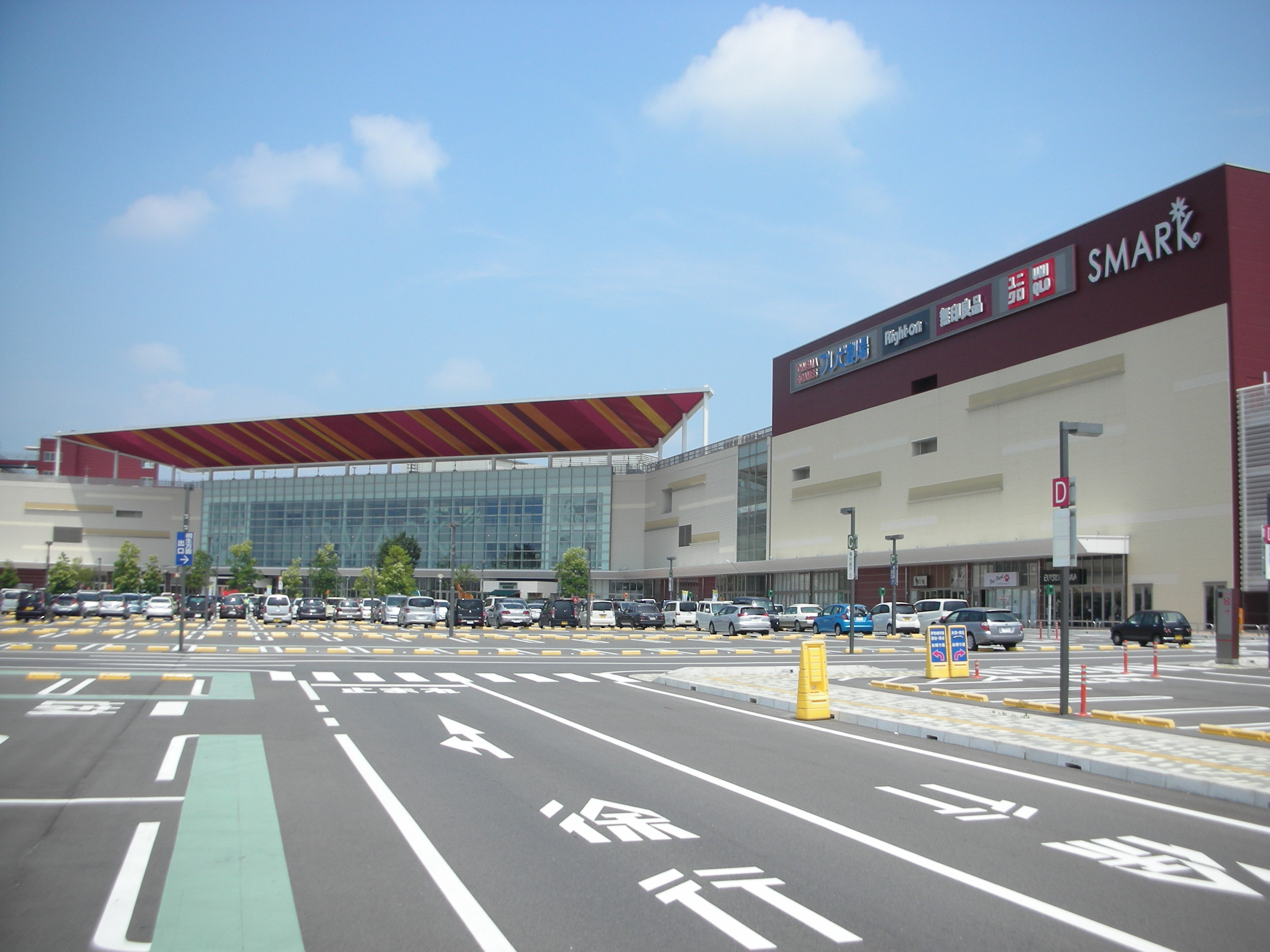 スマーク伊勢崎の外観